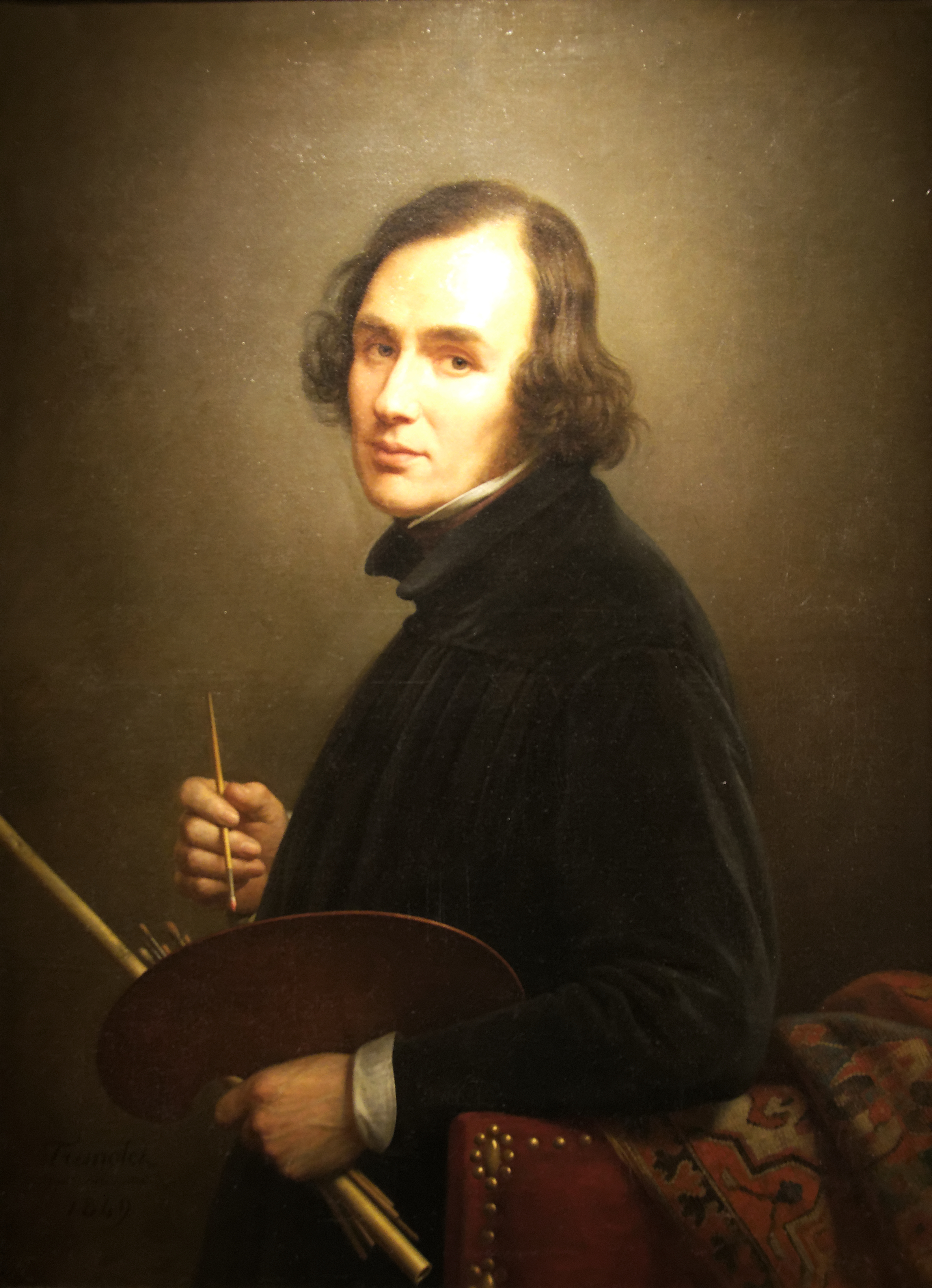 Dépôt du musée du Louvre, 1946.